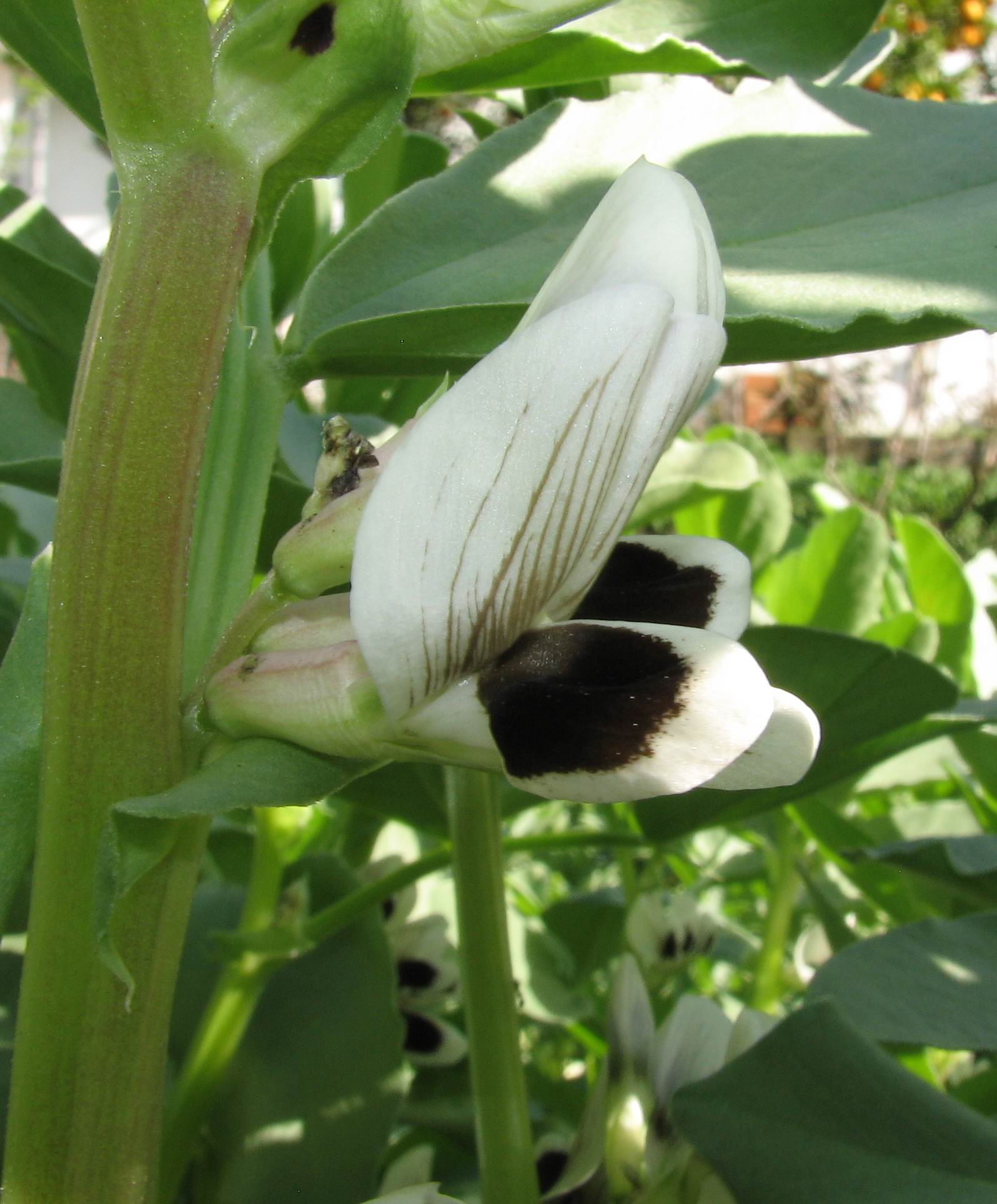 Vicia faba; Author:Daniel Feliciano ; Location:Torres Novas (Portugal)